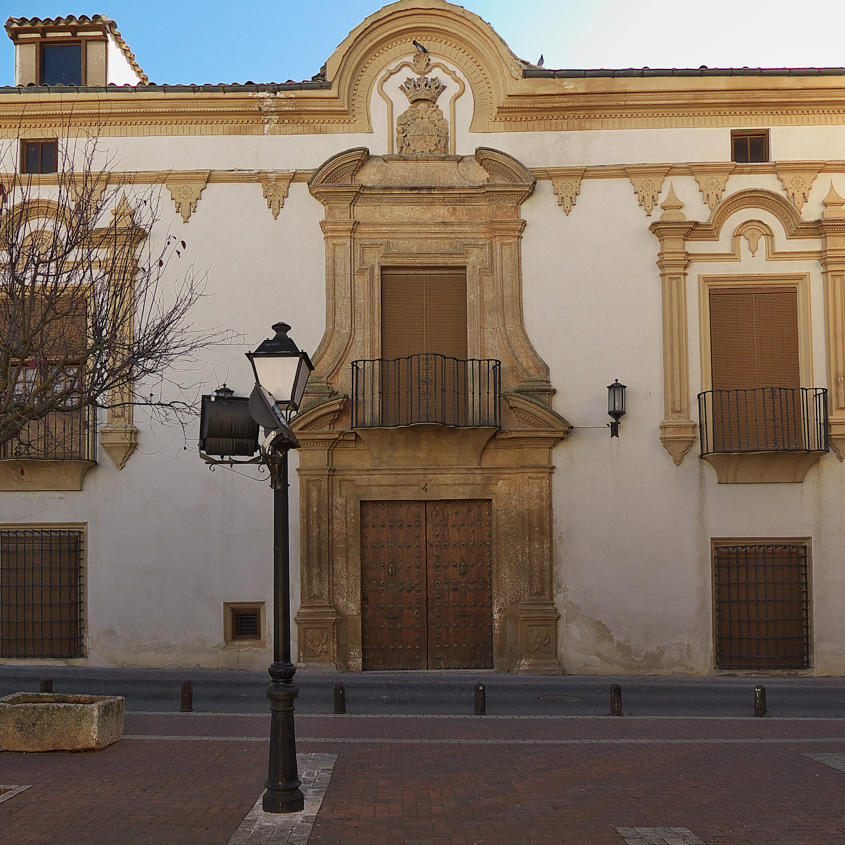 Portada principal del palacio (1722)